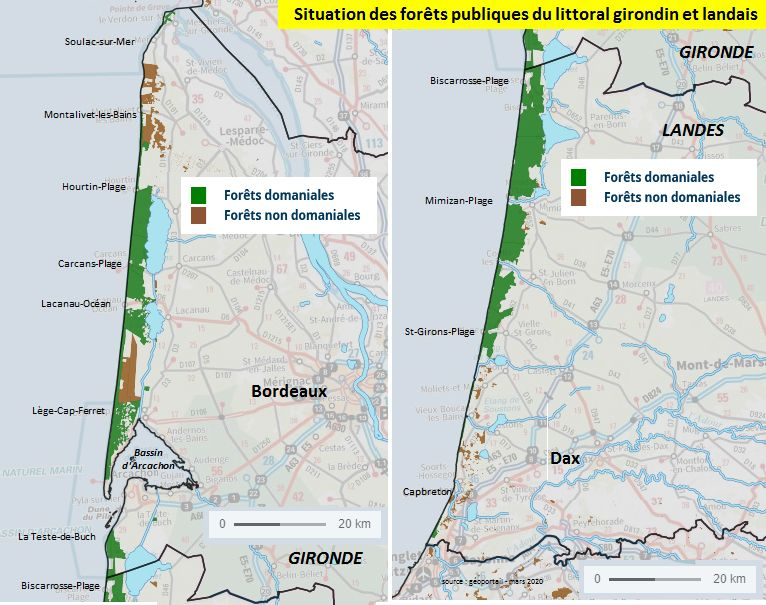 forêts domaniales (appartenant à l'Etat) et non domaniales (pnricipalement appartenant aux communes)